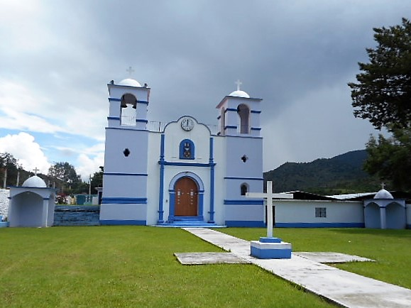 Iglesia de San Juan Evangelista, San Juan Achiutla, Oaxaca, México. 2017